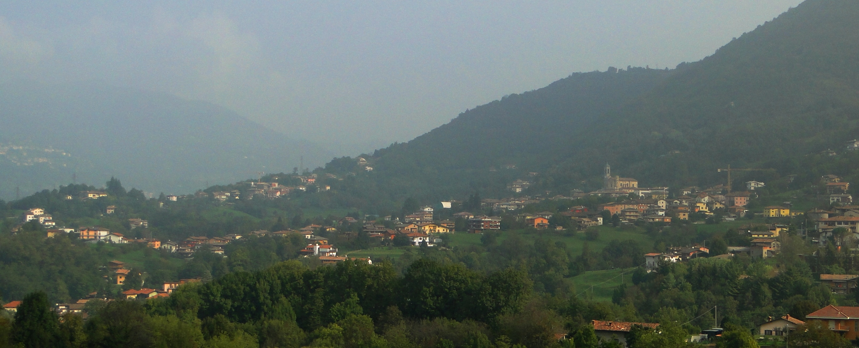 Vall'Alta di Albino (BG), panorama